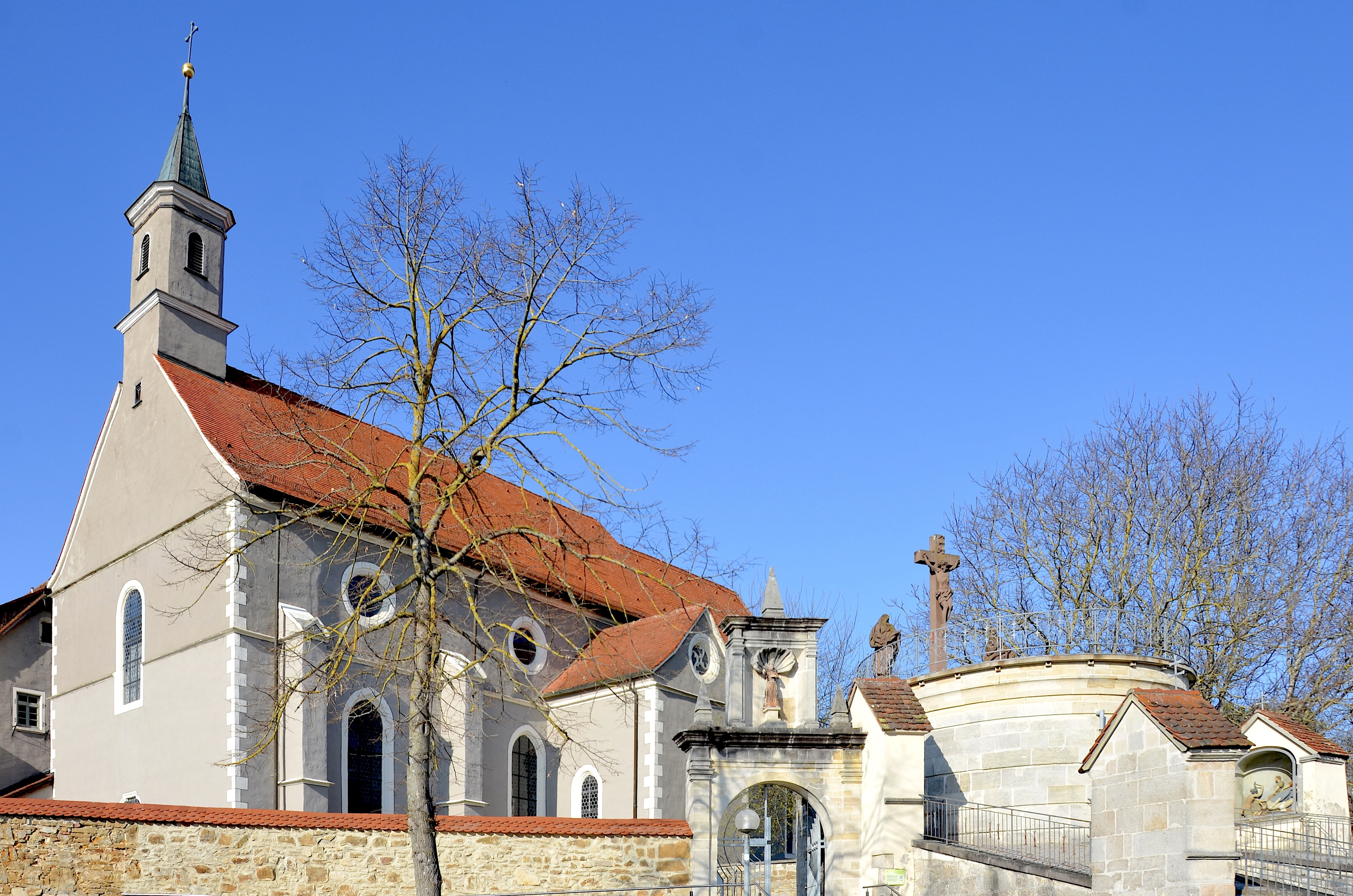 Klosterkirche St. Luzen in Hechingen (2019)